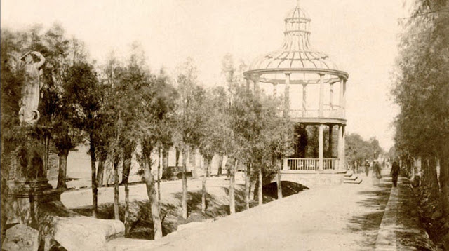 Fotografía de Tacna a fines del siglo XIX o comienzos del siglo XX.